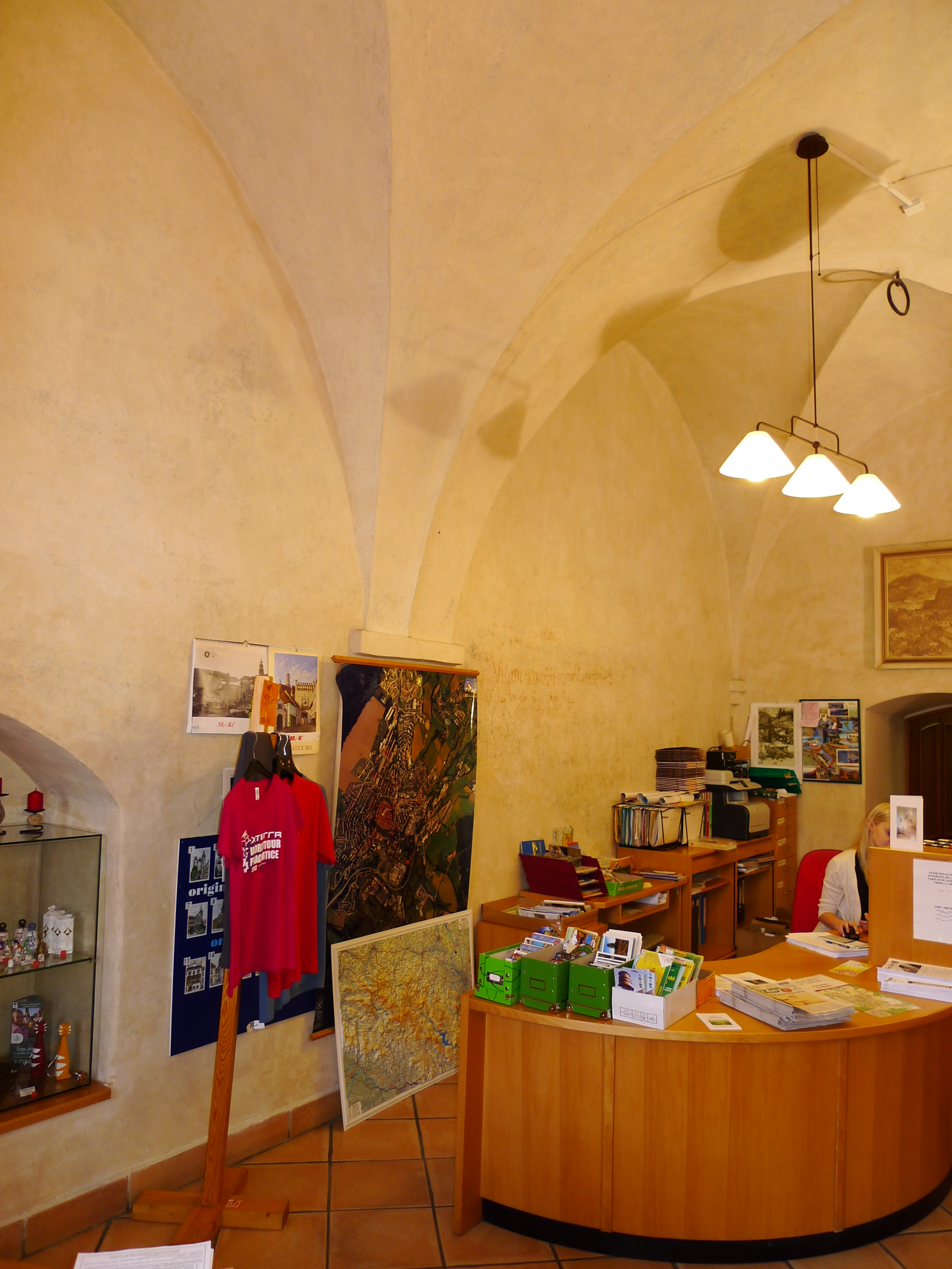 Radnice stará (Prachatice), Velké nám. 1, Prachatice